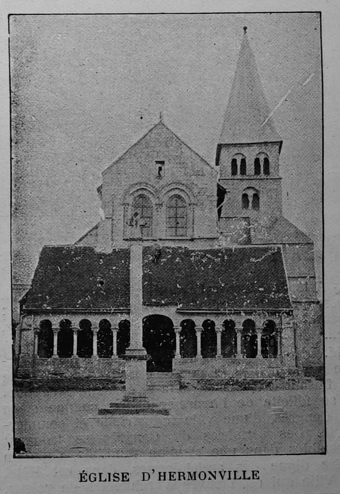 publié dans le "Bulletin de l'œuvre des voyages scolaires".